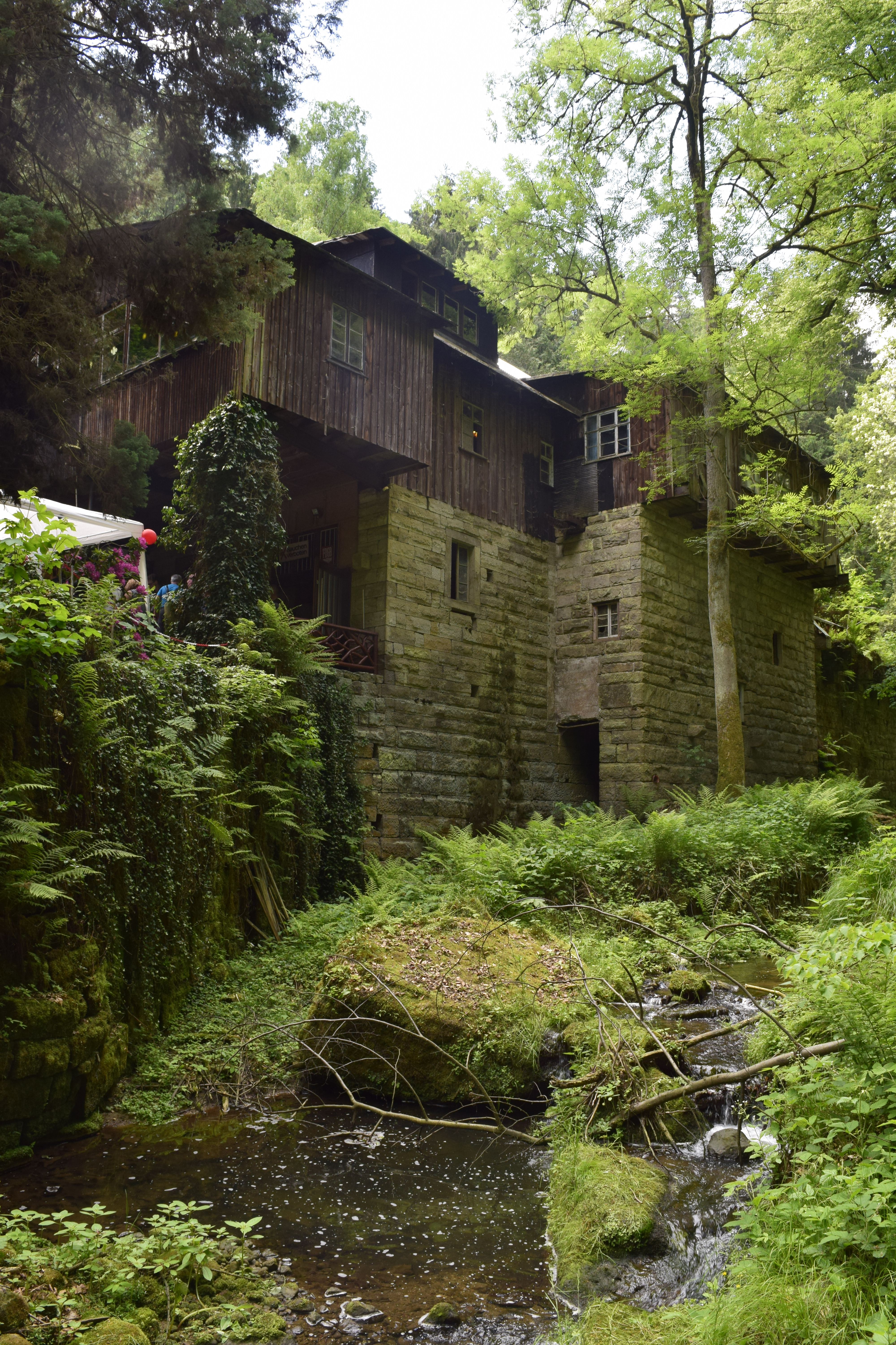 Niedermühle, vom Hirschgrundbach talaufwärts, Mai 2018